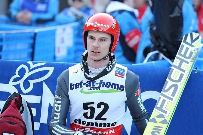 Oficjalne treningi mężczyzn na skoczni K-120 przed konkursem indywidualnym mężczyzn podczas Mistrzostw Świata w Narciarstwie Klasycznym 2013